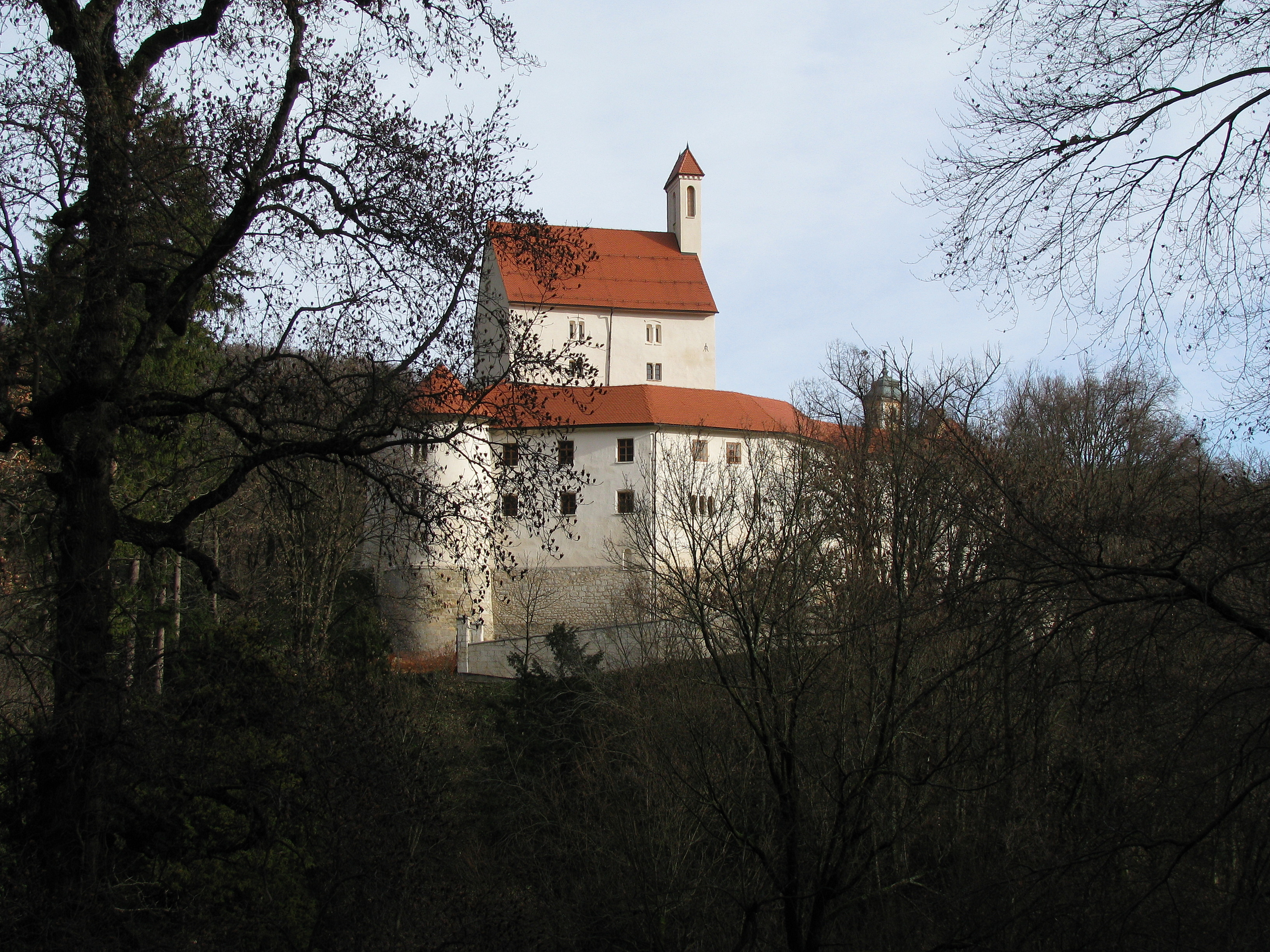 Pišečki grad